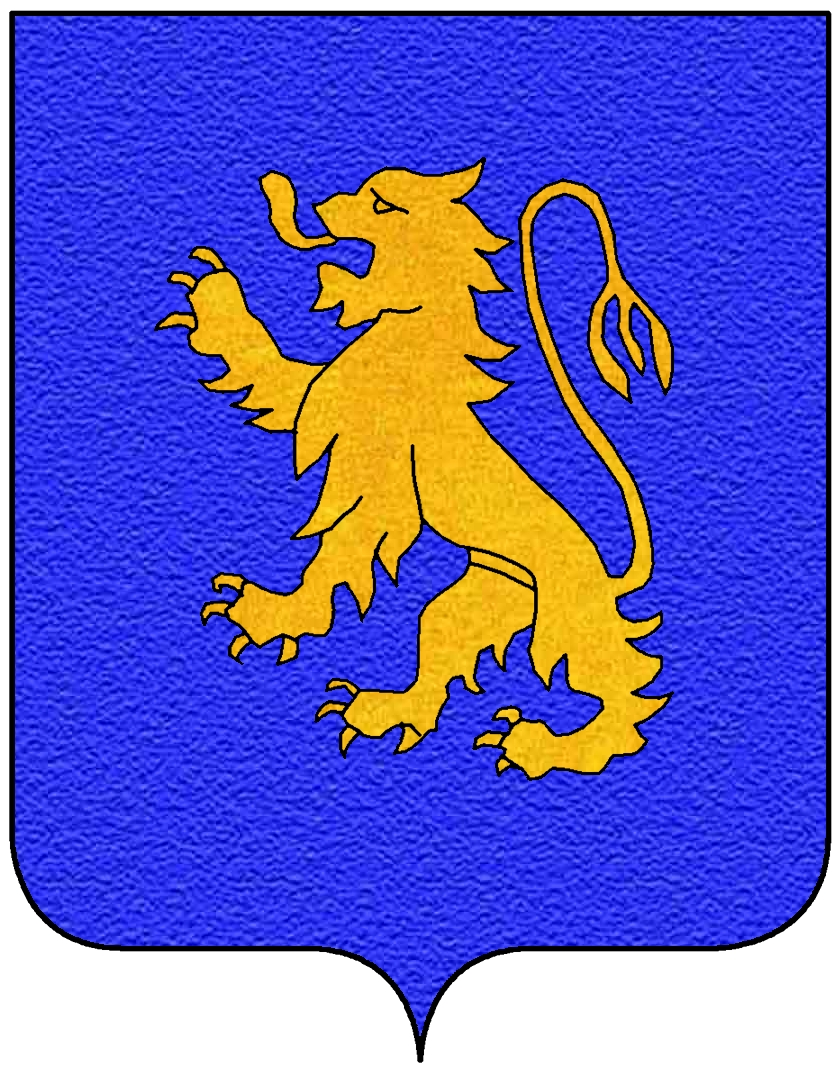 Stemma della famiglia Alberici